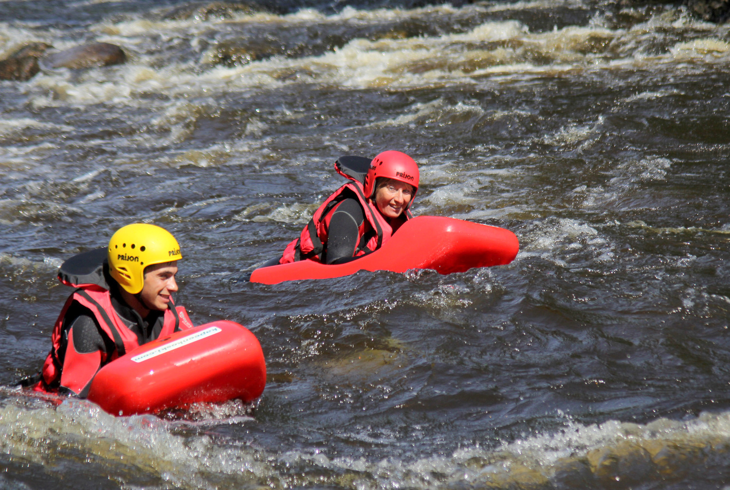 Koskenlaskua koskikelkoilla Kapeenkosken alueen Luijankoskessa Äänekoskella.